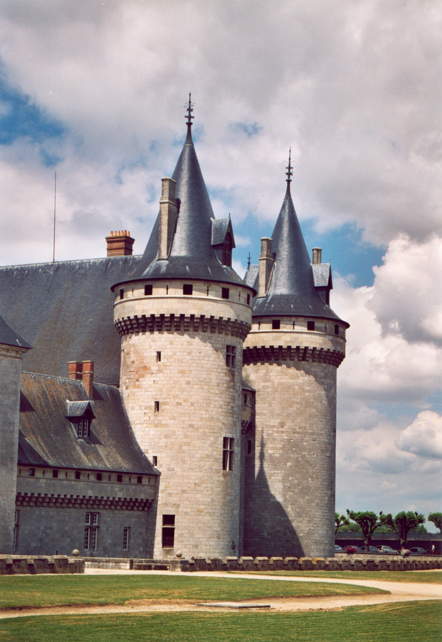 France Loiret Sully-sur-Loire Le château Photographie prise par GIRAUD Patrick